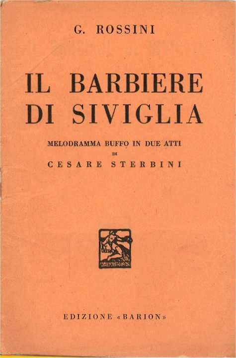 Copertina libretto "Il Barbier di Siviglia" melodramma buffo in due atti di ACesare Sterbini musica di G. Rossini - editore Attilio Barion Sesto San Giovanni - Milano